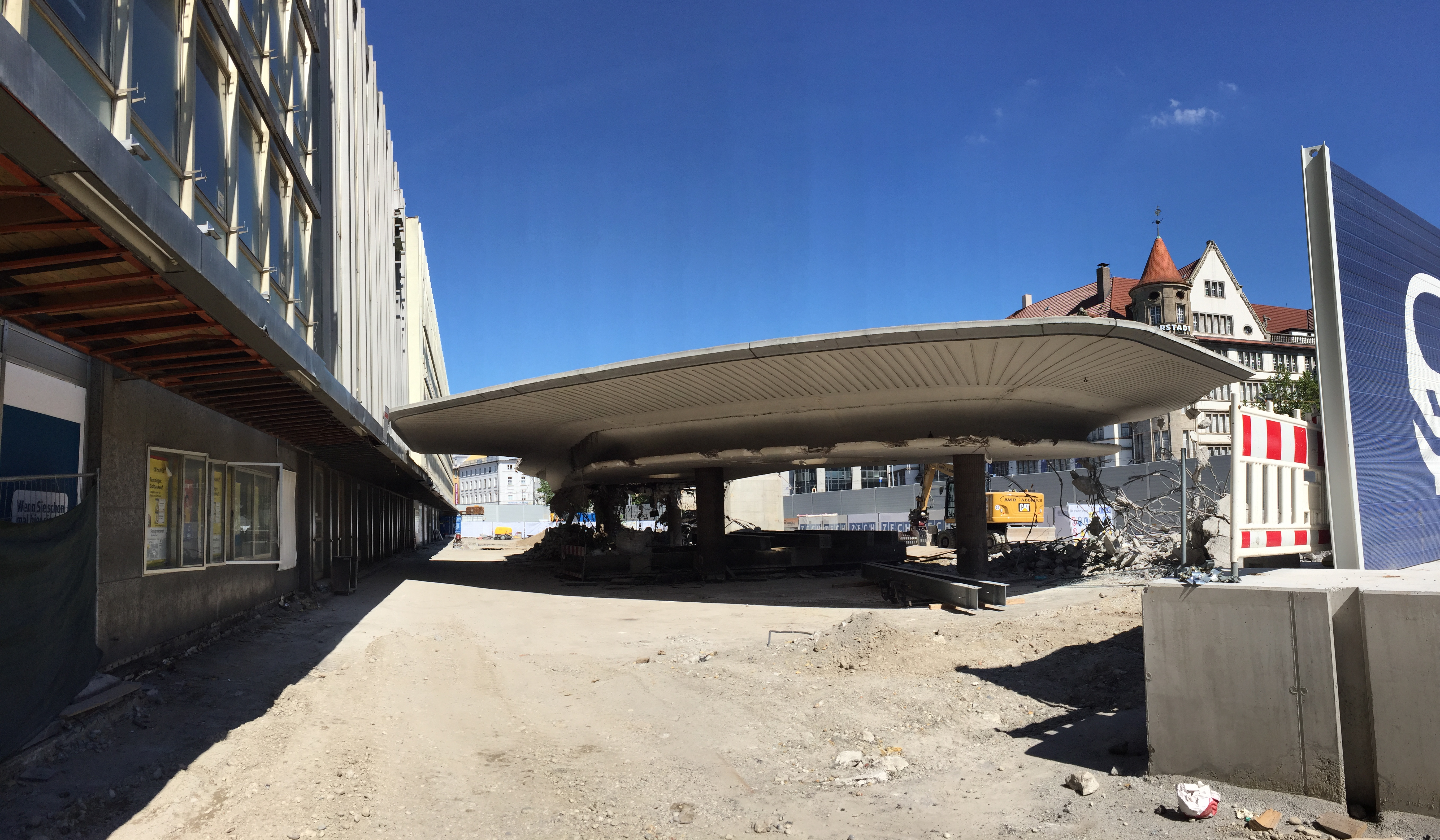 Das charakteristische Vordach vor dem Münchner Hauptbahnhof wird im September 2019 abgebrochen.